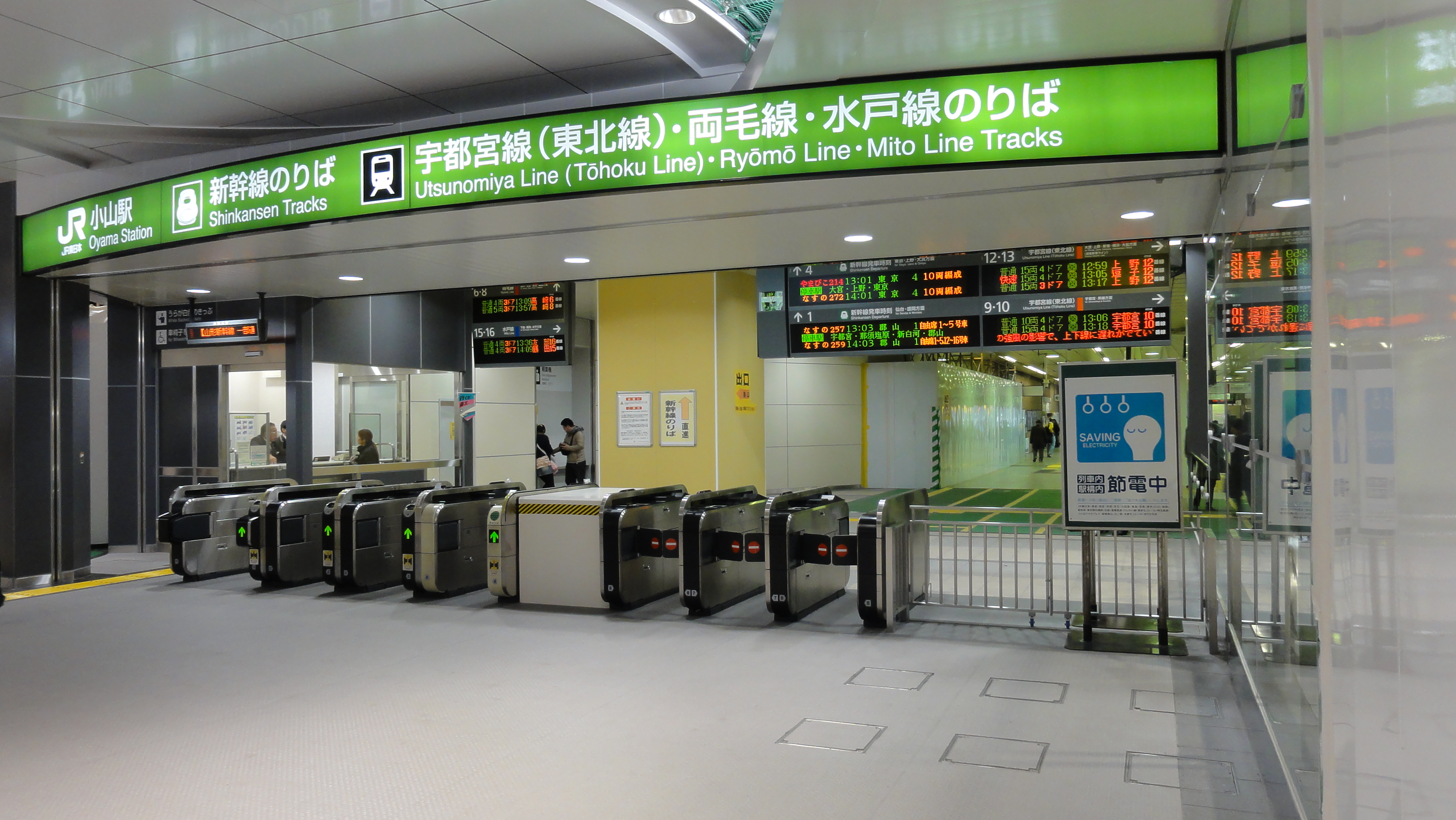 JR東日本小山駅 中央改札口